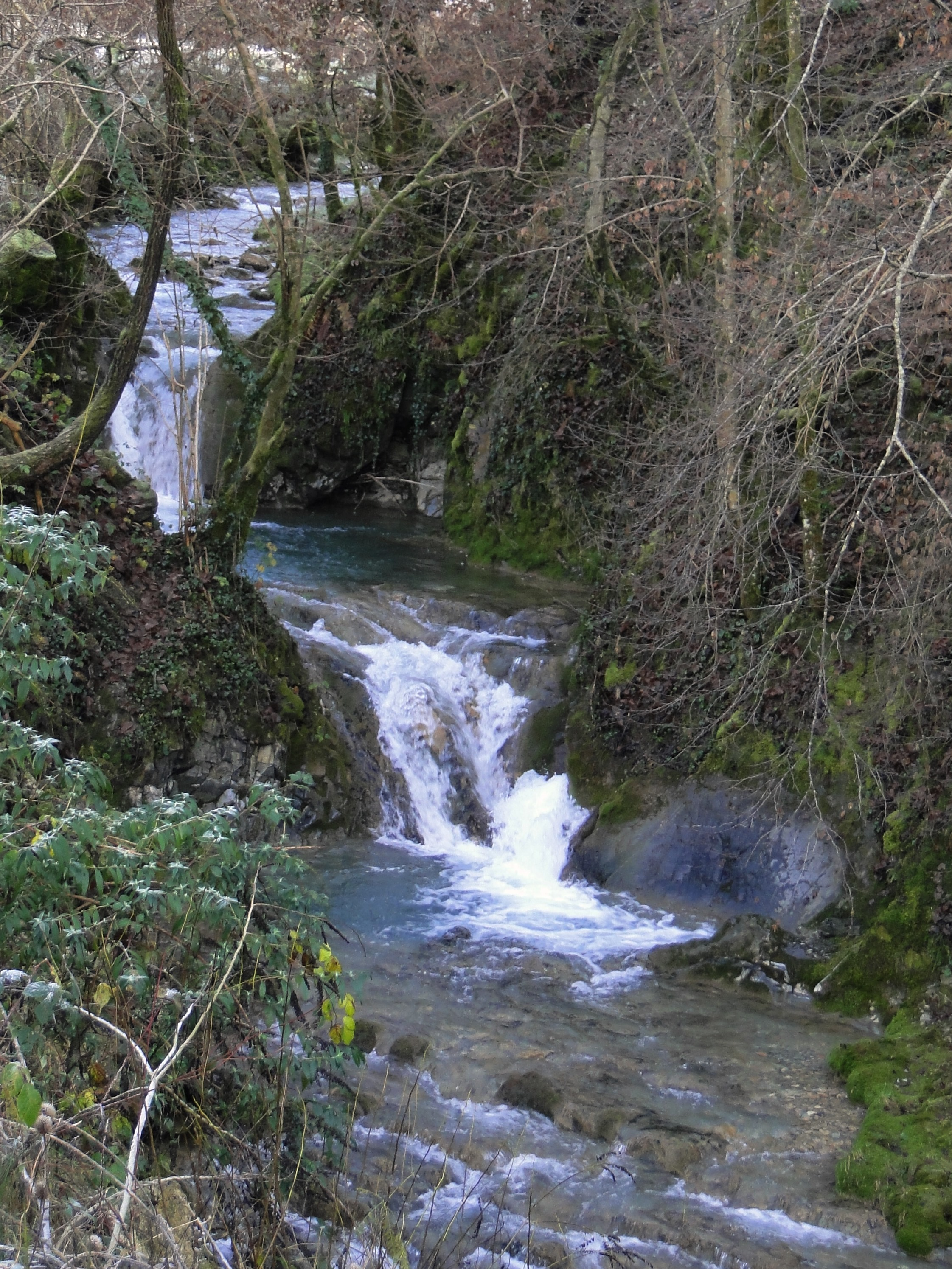 Torrente Rino tra Leffe e Peia (BG). Italy